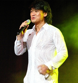 Wakin ChauWakin Chau